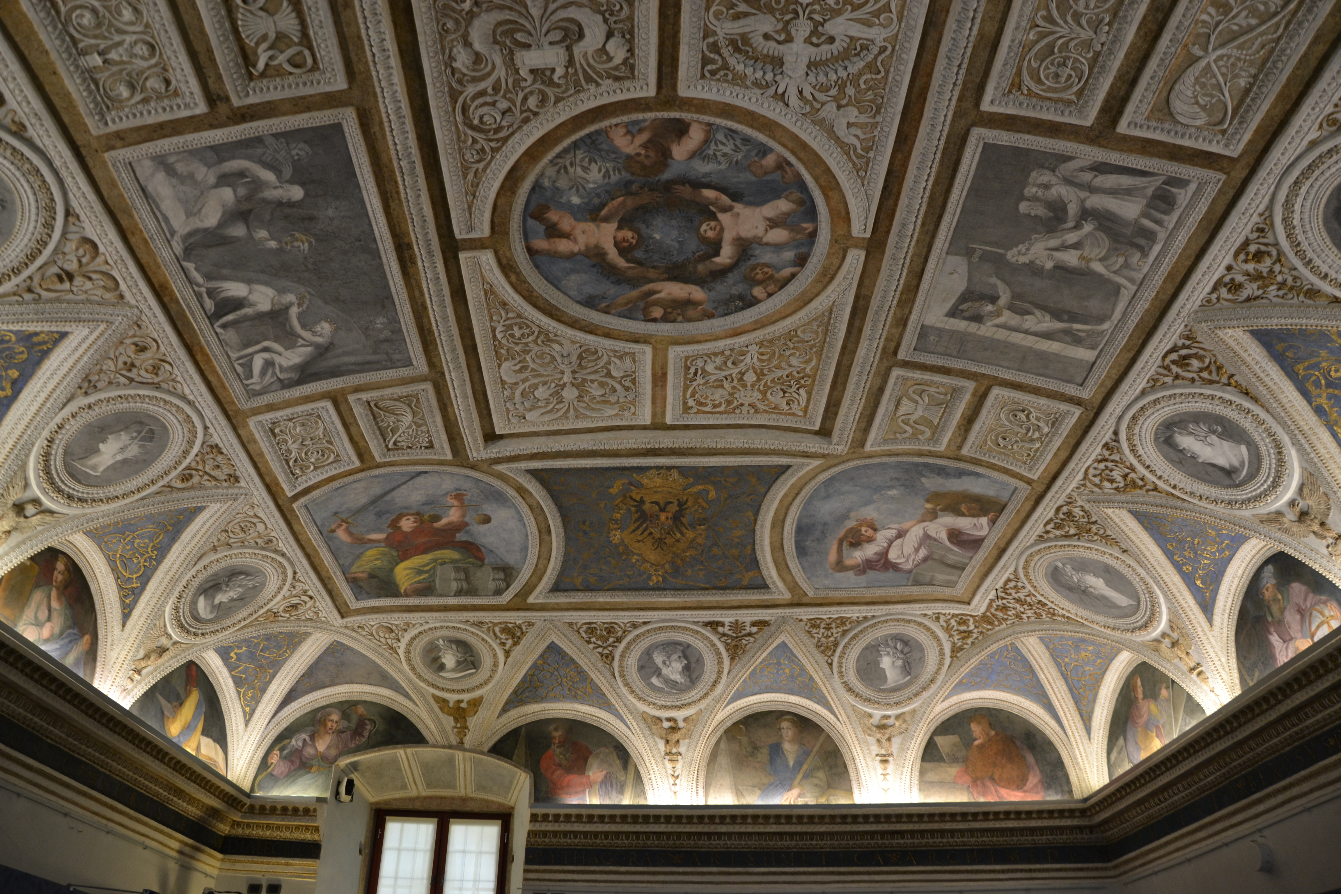 camera del Camin nero, Dosso Dossi e Battista Dossi, Trento, Castello del Buonconsiglio